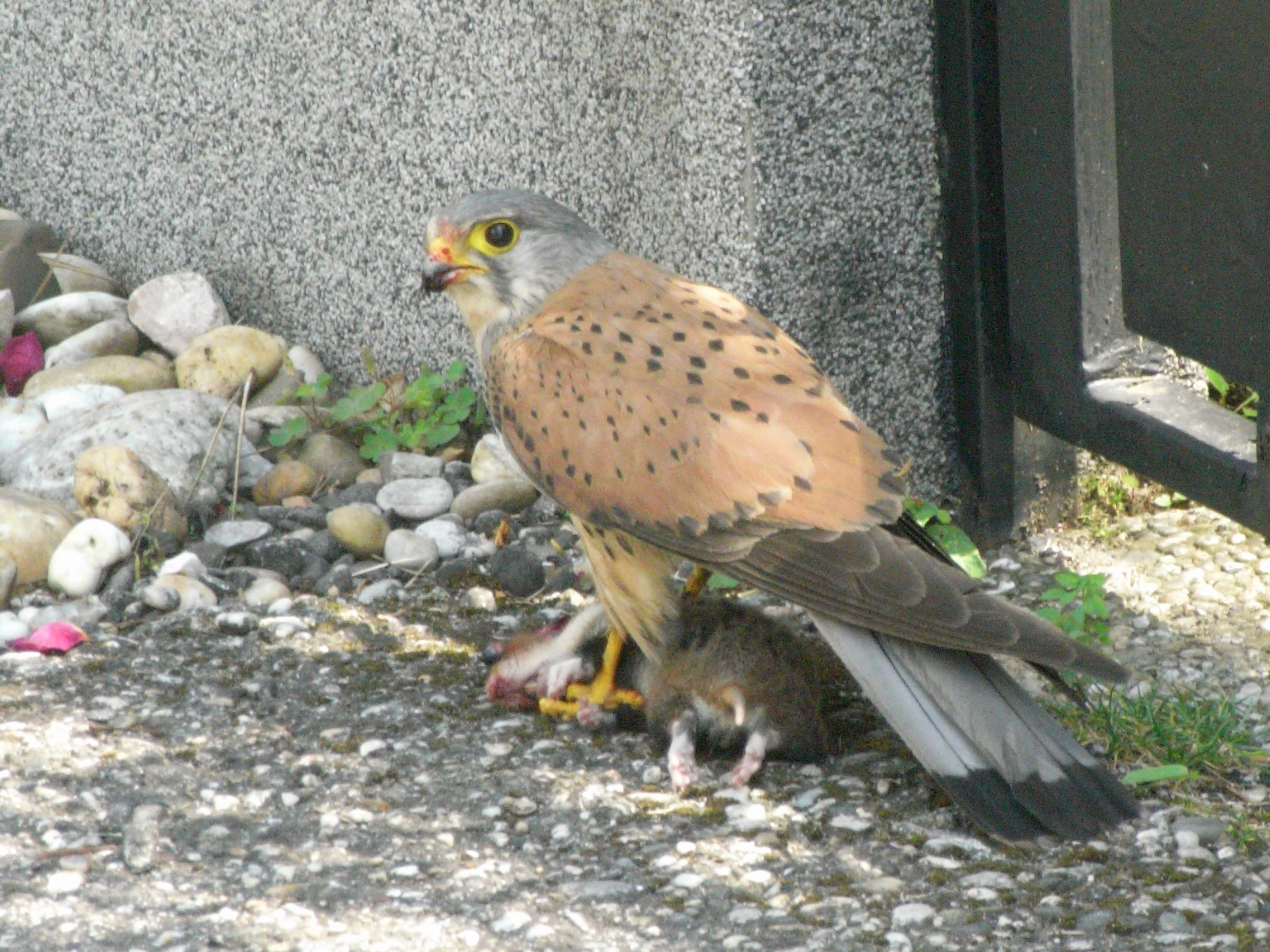 Männlicher Turmfalke mit Feldhamster in einer Gartensiedlung (Wien-Favoriten)